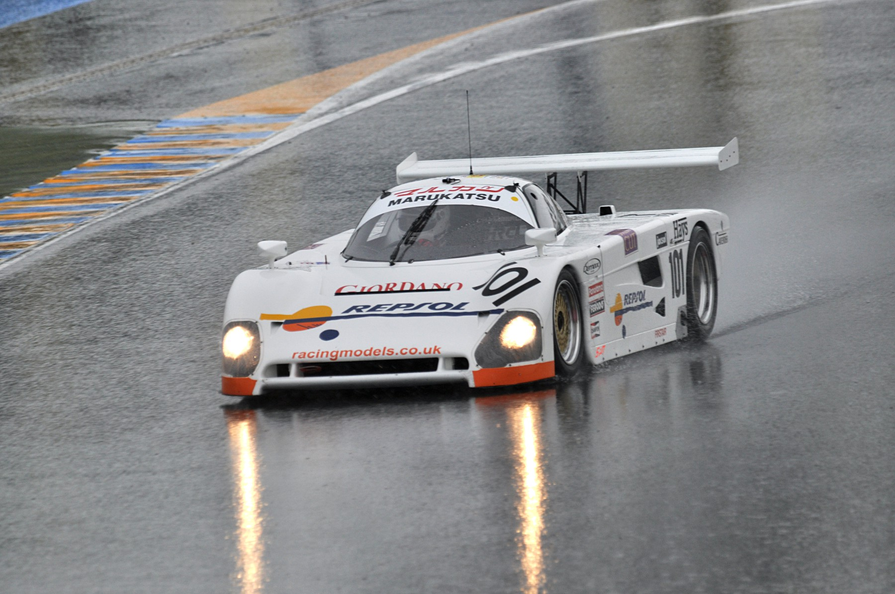 Spice SE88C - Ford de l'écurie Chamberlain Engineering ayant participée aux 24 Heures du Mans 1989 avec comme pilote Fermín Vélez, Nick Adams et Luigi Taverna